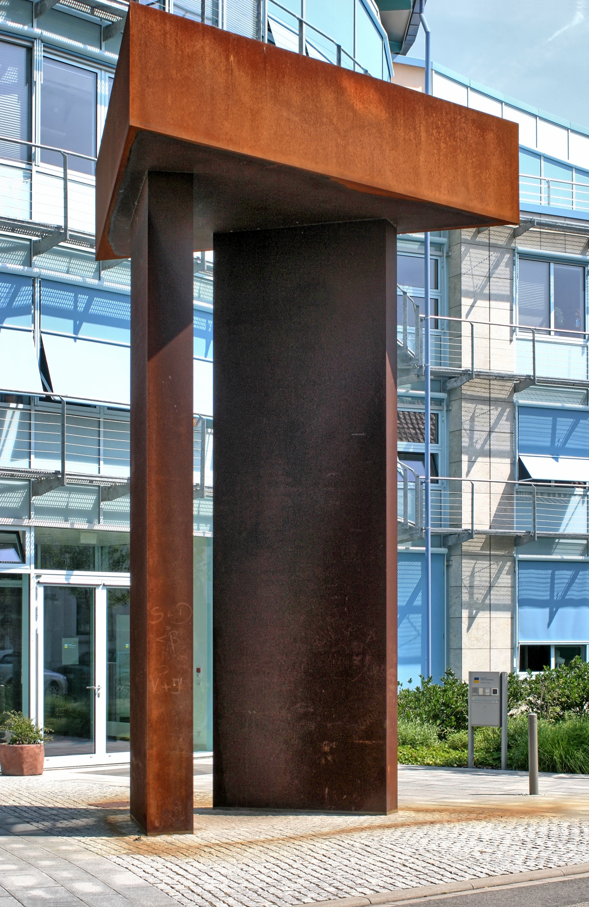 Das Bild zeigt eine Skulptur aus Cortenstahl des Künstlers Christoph Mancke vor dem Gebäude der Deutschen Rentenversicherung Rheinland-Pfalz in Speyer